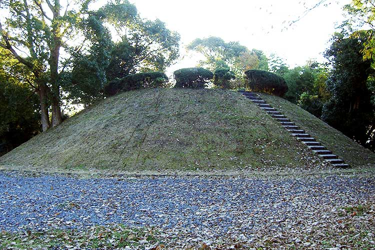 免ヶ平古墳（川部・高森古墳群）、大分県宇佐市。